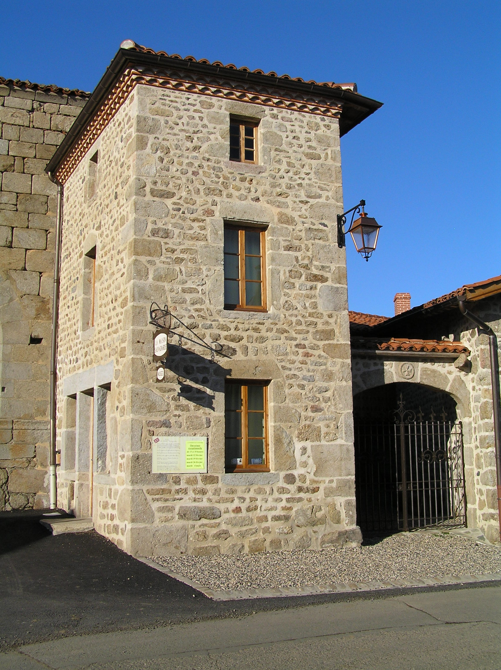 Le musée de la fourme et des traditions (maison sauvagnarde) à Sauvain (Loire)